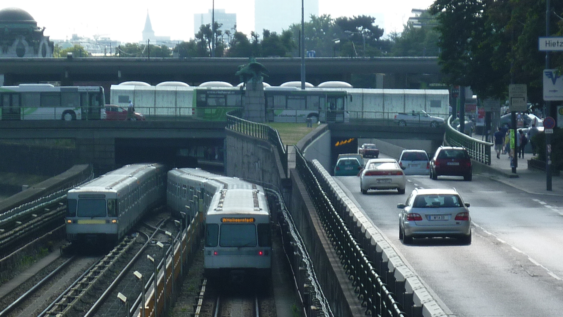 Kennedy Bridge in Vienna, linking 13th and 14th districts separated by the Wien river, seen from the West, with underground trains and cars at an underpass Kennedybrücke in Wien, die 13. und 14. Bezirk über den Wienfluss verbindet, mit U-Bahn-Zügen und Autos an der Unterführung